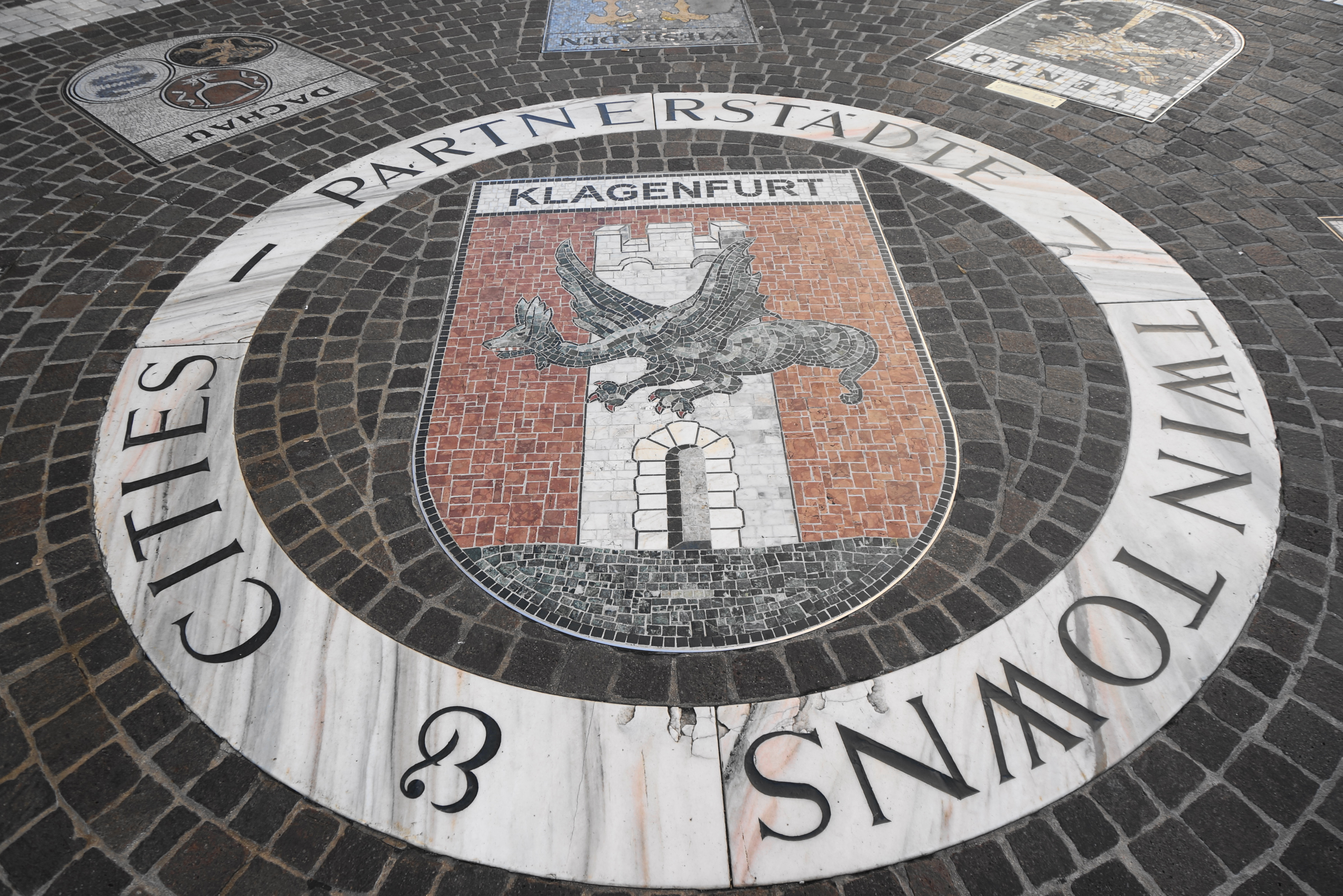 Wappen von Klagenfurt in der Fußgängerzone am Arthur Lemisch Platz mit dem Schriftzug Partnerstädte - twin towns Klagenfurt hat 15 Partnerstädte. Mit Wiesbaden verbindet Klagenfurt die älteste Städte-partnerschaft der Welt. Seit 1930 gibt es intensive Kontakte. Seit 1930 sind 14 weitere Partnerstädte dazugekommen. Klagenfurt pflegt Verbindungen mit Städten in anderen politischen Systemen, mit Gemeinden hinter dem „Eisernen Vorhang”. Einige dieser Städte sind heute auch bereits in der Europäischen Union. • Duschanbe – Tadschikistan • Wiesbaden – Deutschland • Gorizia – Italien • Nova Gorica – Slowenien • Gladsaxe – Dänemark • Dessau – Deutschland • Dachau – Deutschland • Rzeszow – Polen • Zalaegerszeg – Ungarn • Sibiu-Hermannstadt – Rumänien • Nazareth-Illit – Israel • Czernowitz – Ukraine • Tarragona – Spanien • Nanning – China • Laval – Kanada